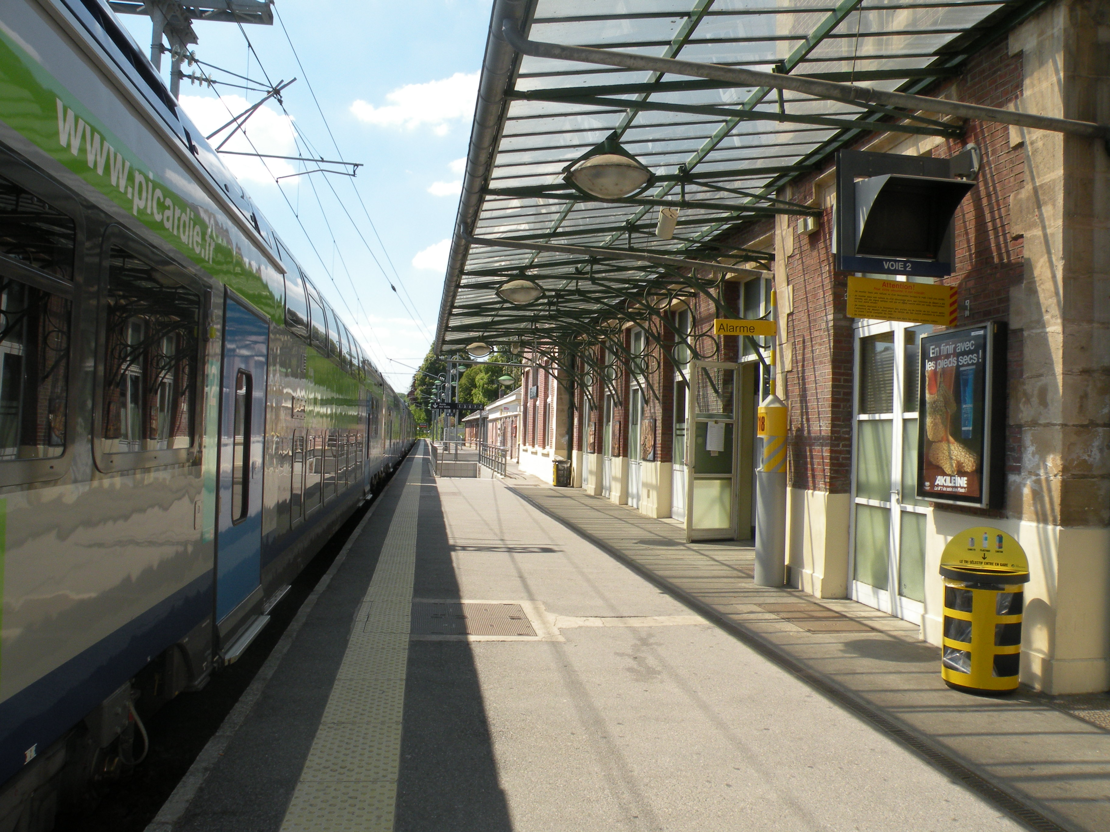 quai de la gare de beauvais, oise france